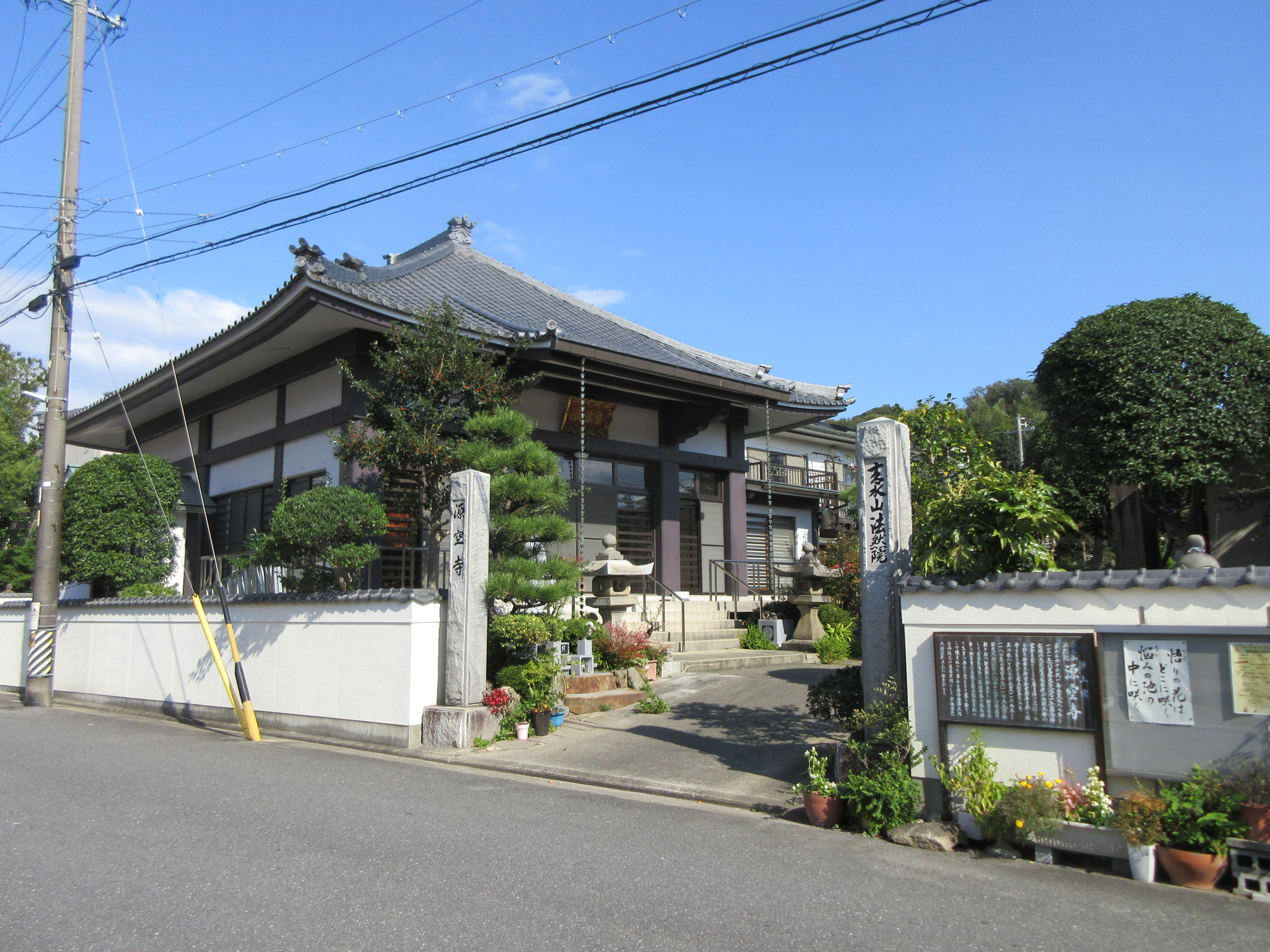 源空寺（岡崎市東能見町）